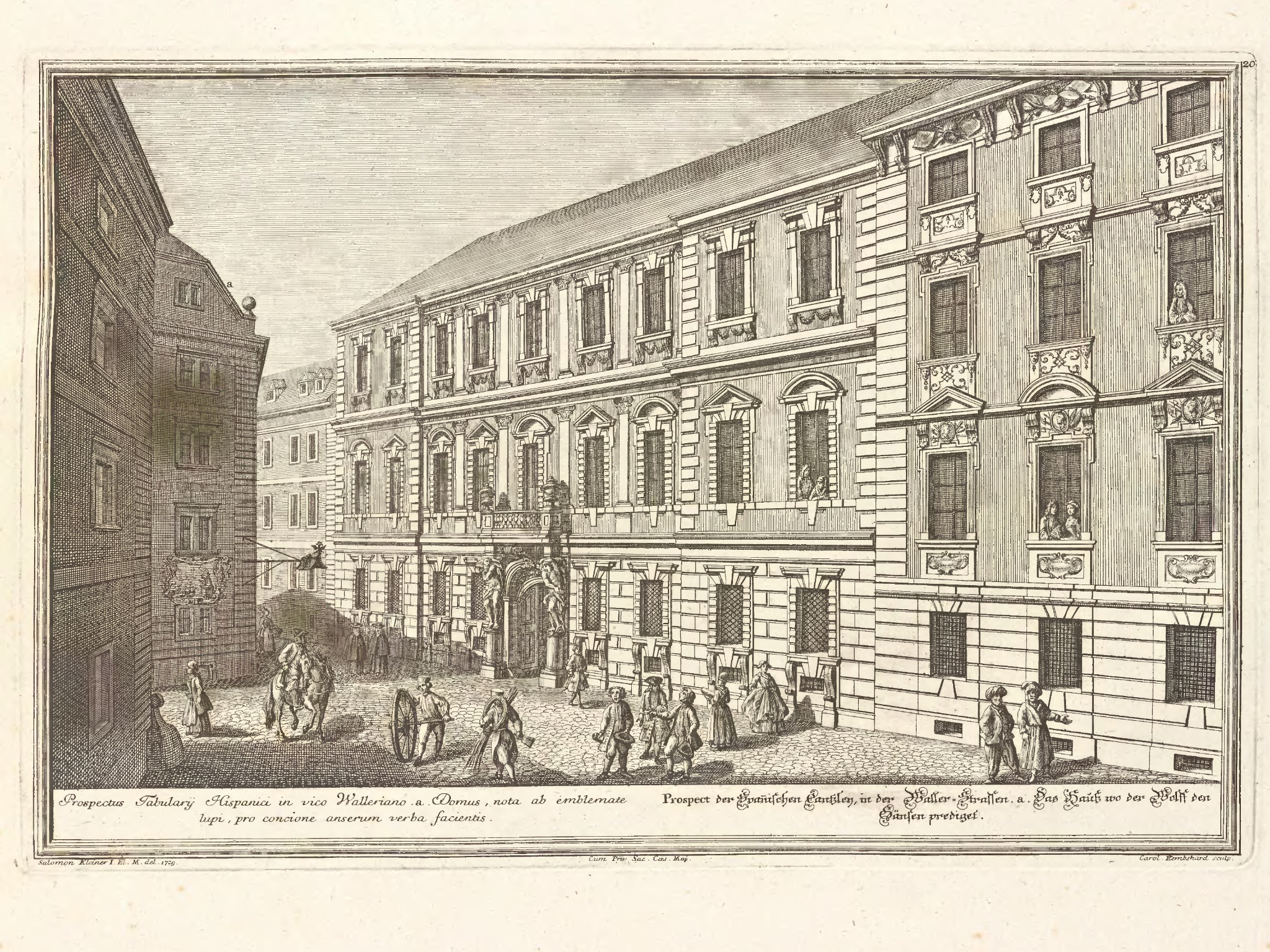 Die Spanische Hofkanzlei in der Wallnerstraße in Wien, heute als Palais Caprara-Geymüller bekannt. Stich von Salomon Kleiner.